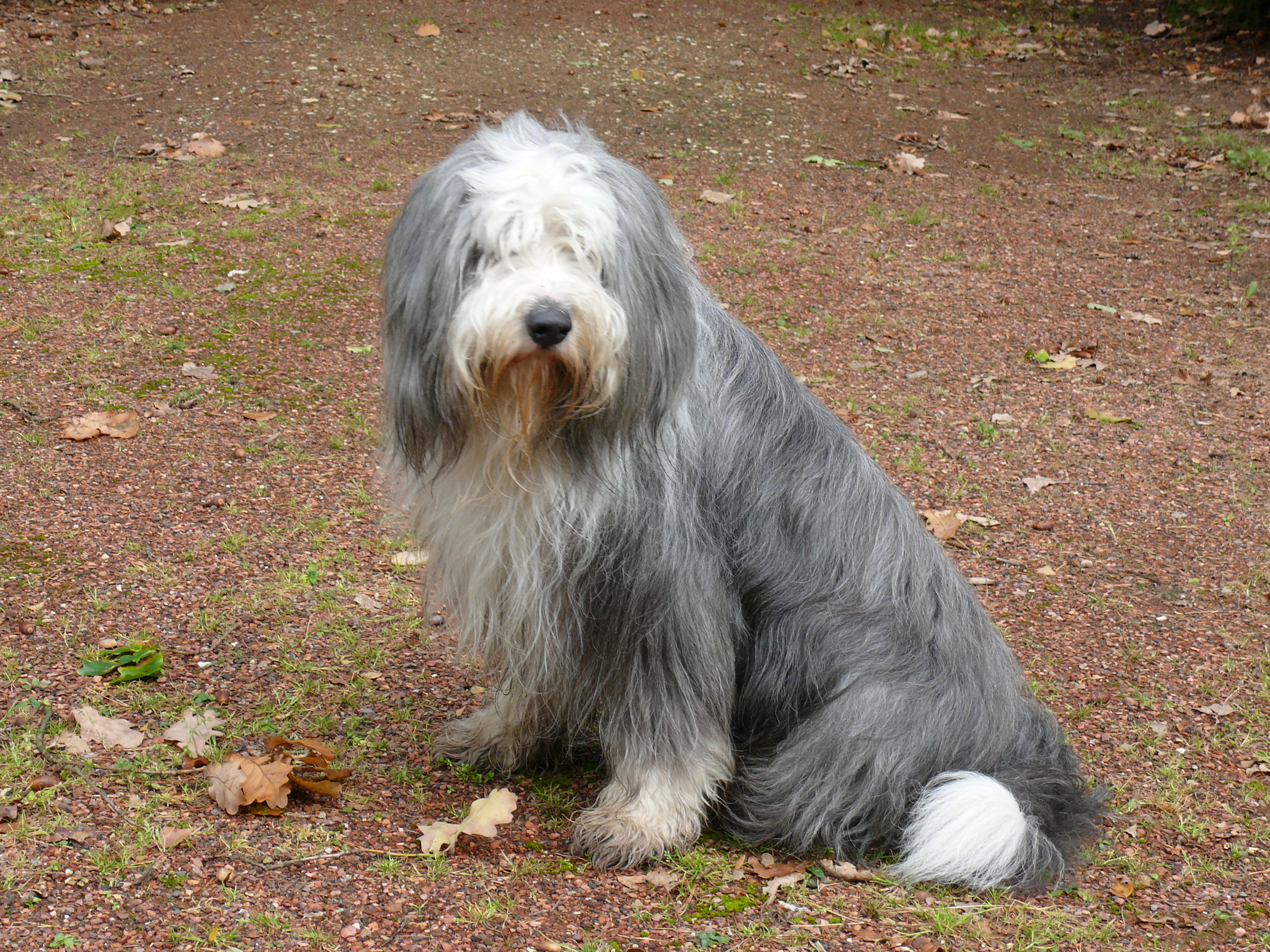 vierjähriger Bearded Collie der in einer Schule für autistische Kinder arbeitet